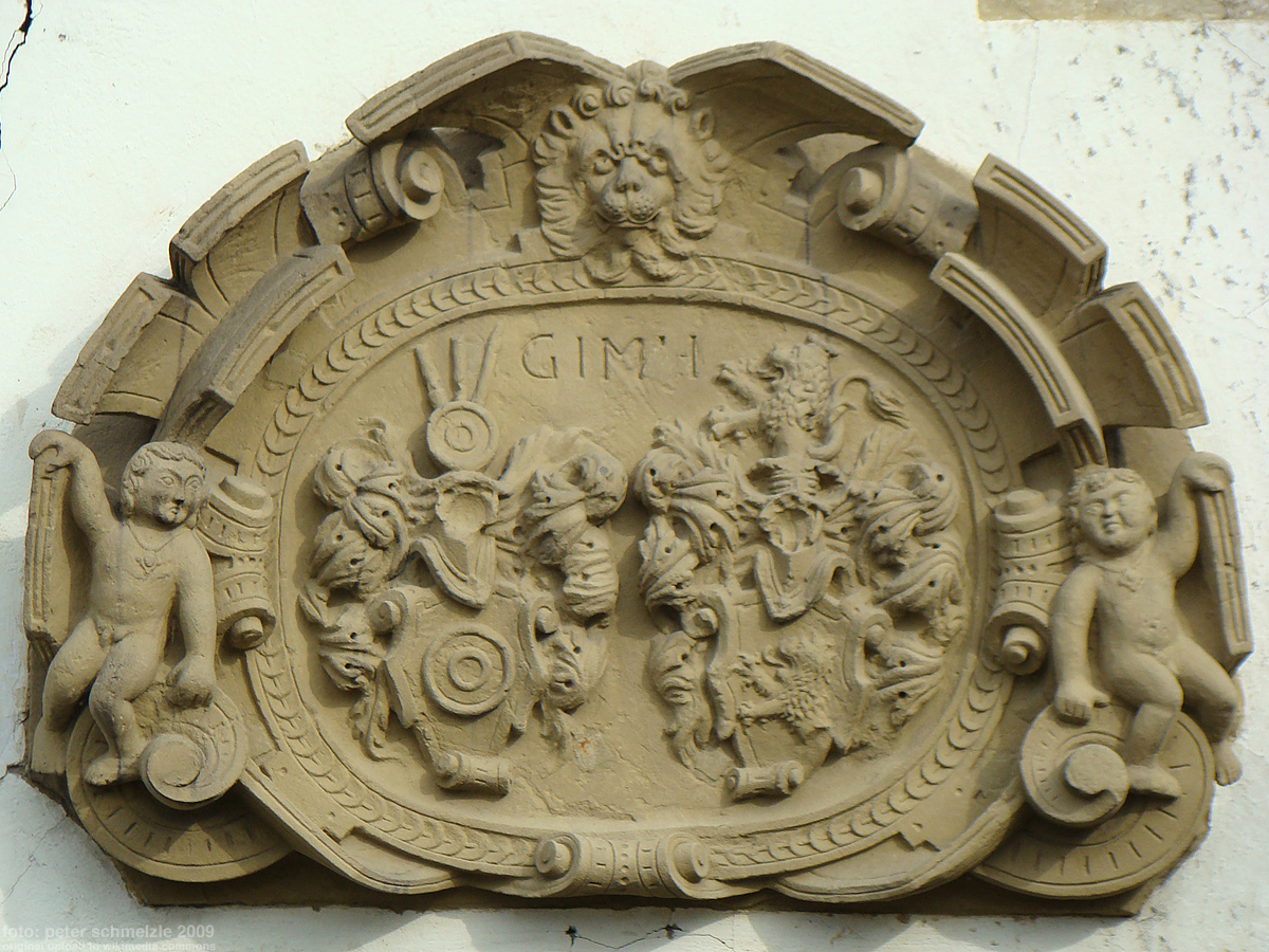 Chanowsky-Wappen am Chanowskyschen Schhlösschen in Langenbrettach-Brettach